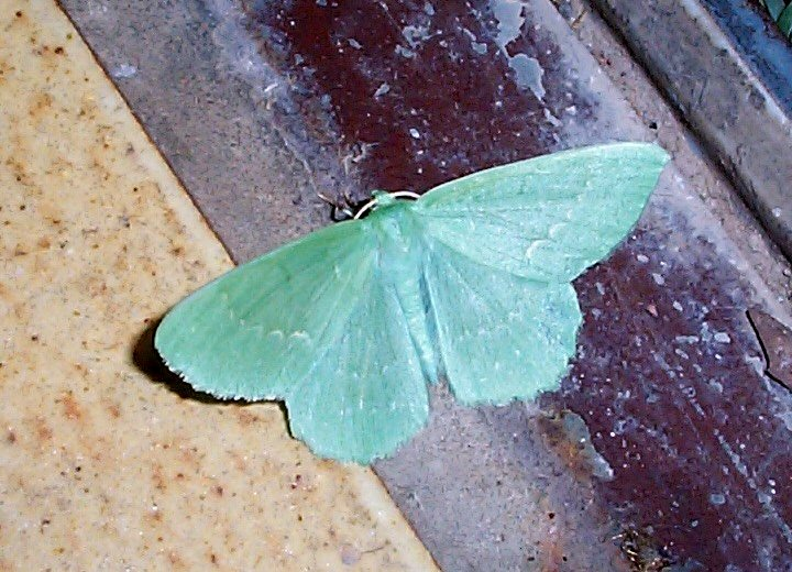 Geometra papilionaria (Large emerald, Grünes Blatt)